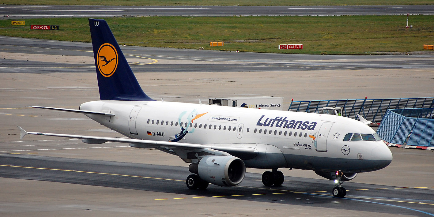 lufthansa barcelona